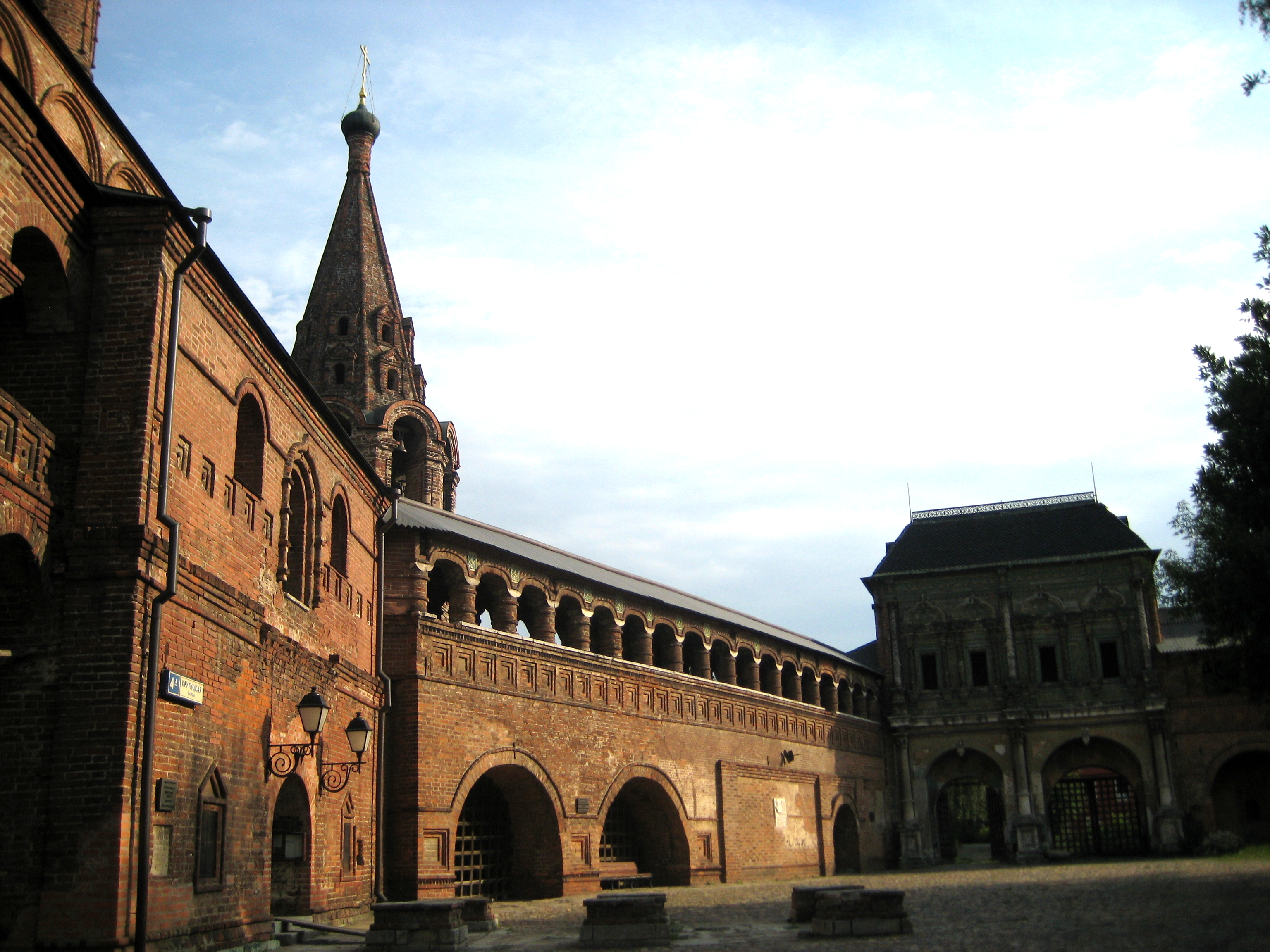 Крутицкое подворье